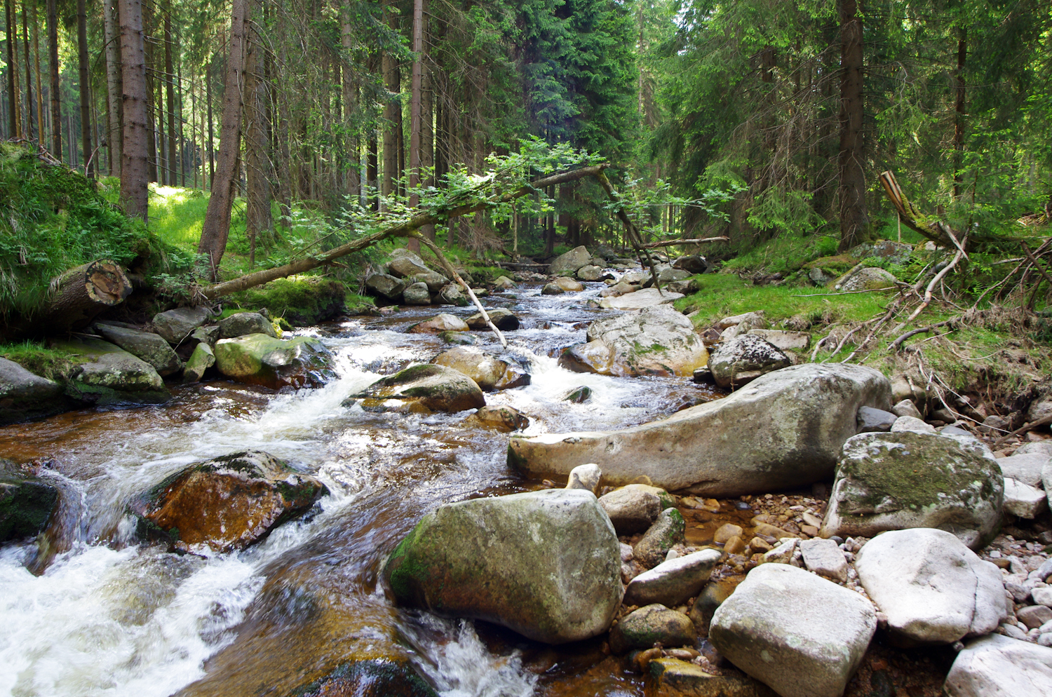 říčka Rolava, Krušné hory, mezi Novými Hamry a bývalou obcí Chaloupky